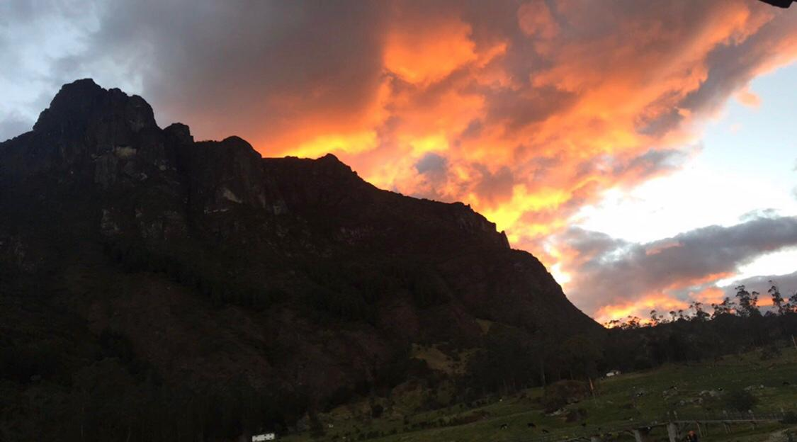 Paisaje del cerro San Pablo